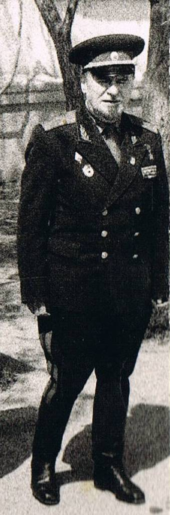 Командир 5-й гв.сд генерал-майор Петерс Георгий Борисович Герой Советского Союза. Баку 1969.